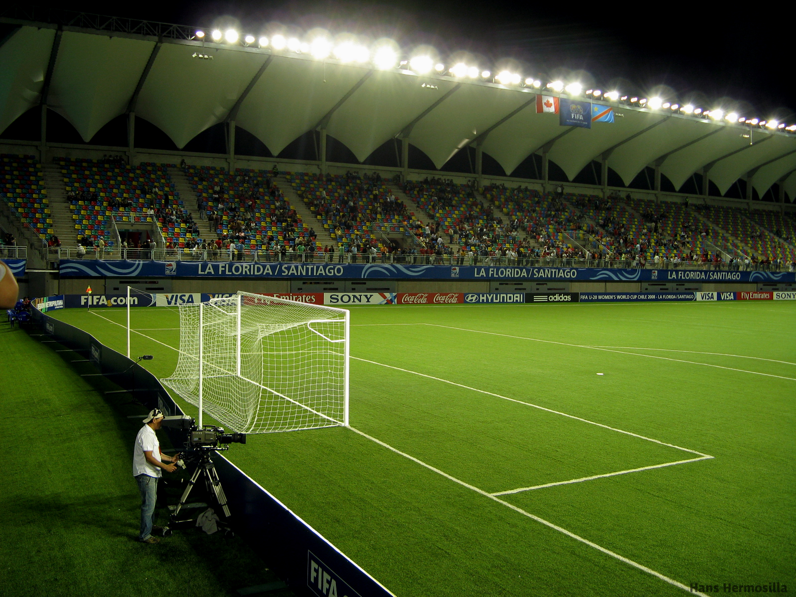 Vista nocturna desde el sector de Galería Norte